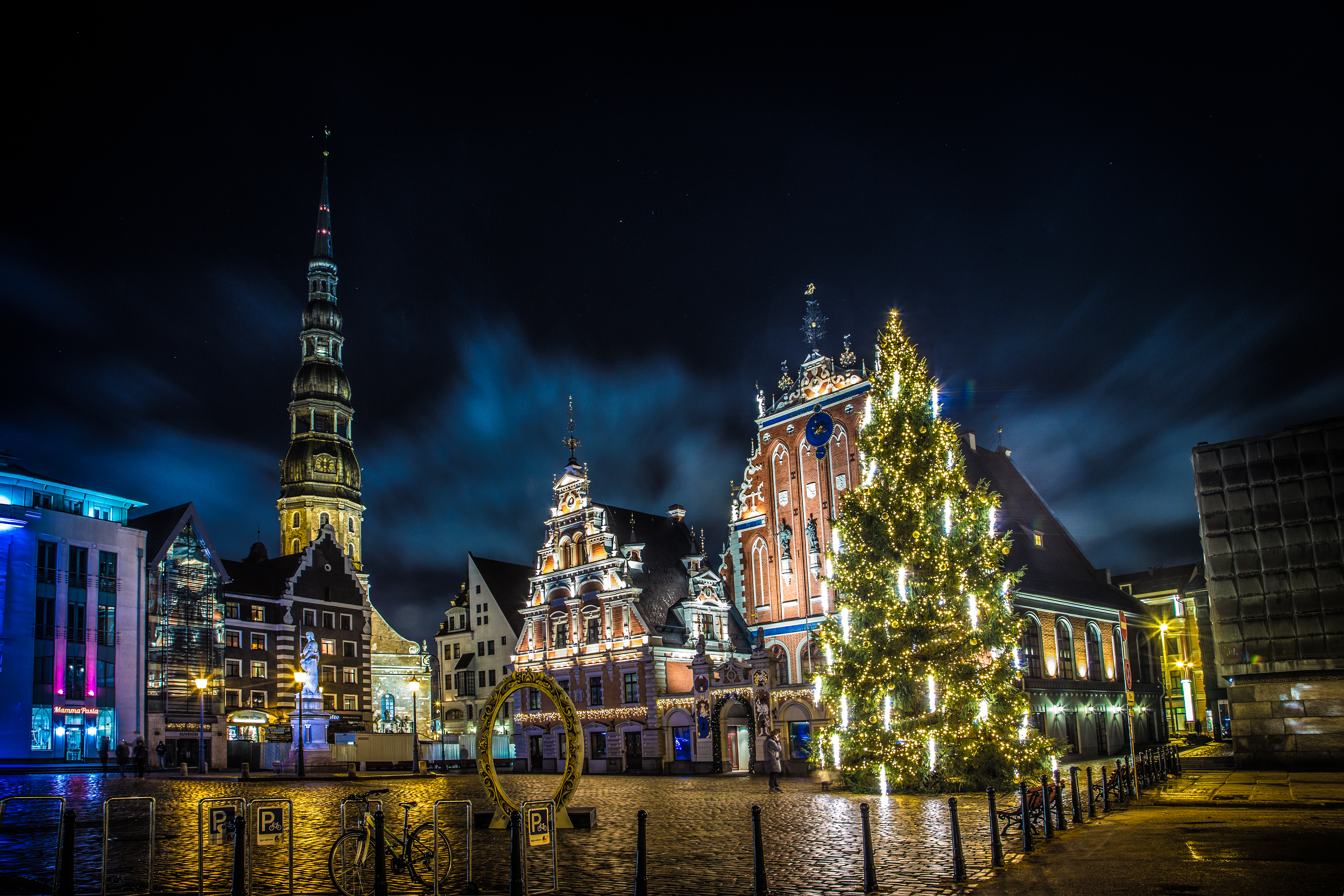 Ратушная площадь в Риге (латыш. Rātslaukums) вечером в канун Рождества и Нового года